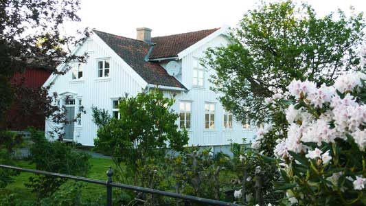 Gammelt trehus i Rosenberggate ved Lillesand Sentrum